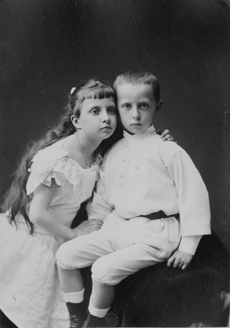 Les Infants de Madrid, Blanche (1868-1949) et Jacques (1870-1931).